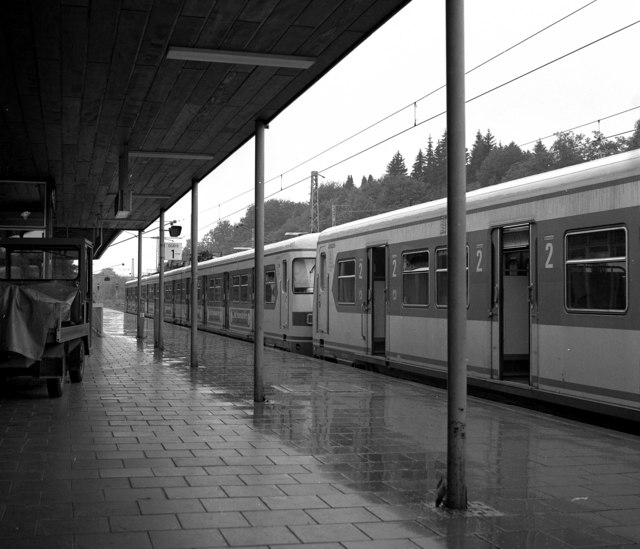 Tutzing S-Bahn station